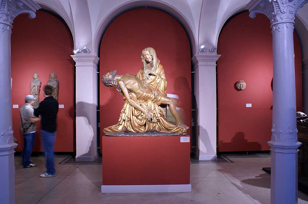 Wrocław Stare Miasto, pl. Powstańców Warszawy 5 - Muzeum Narodowe, dawny gmach Zarządu Prowincji (zabytek nr A/5258/325/Wm)